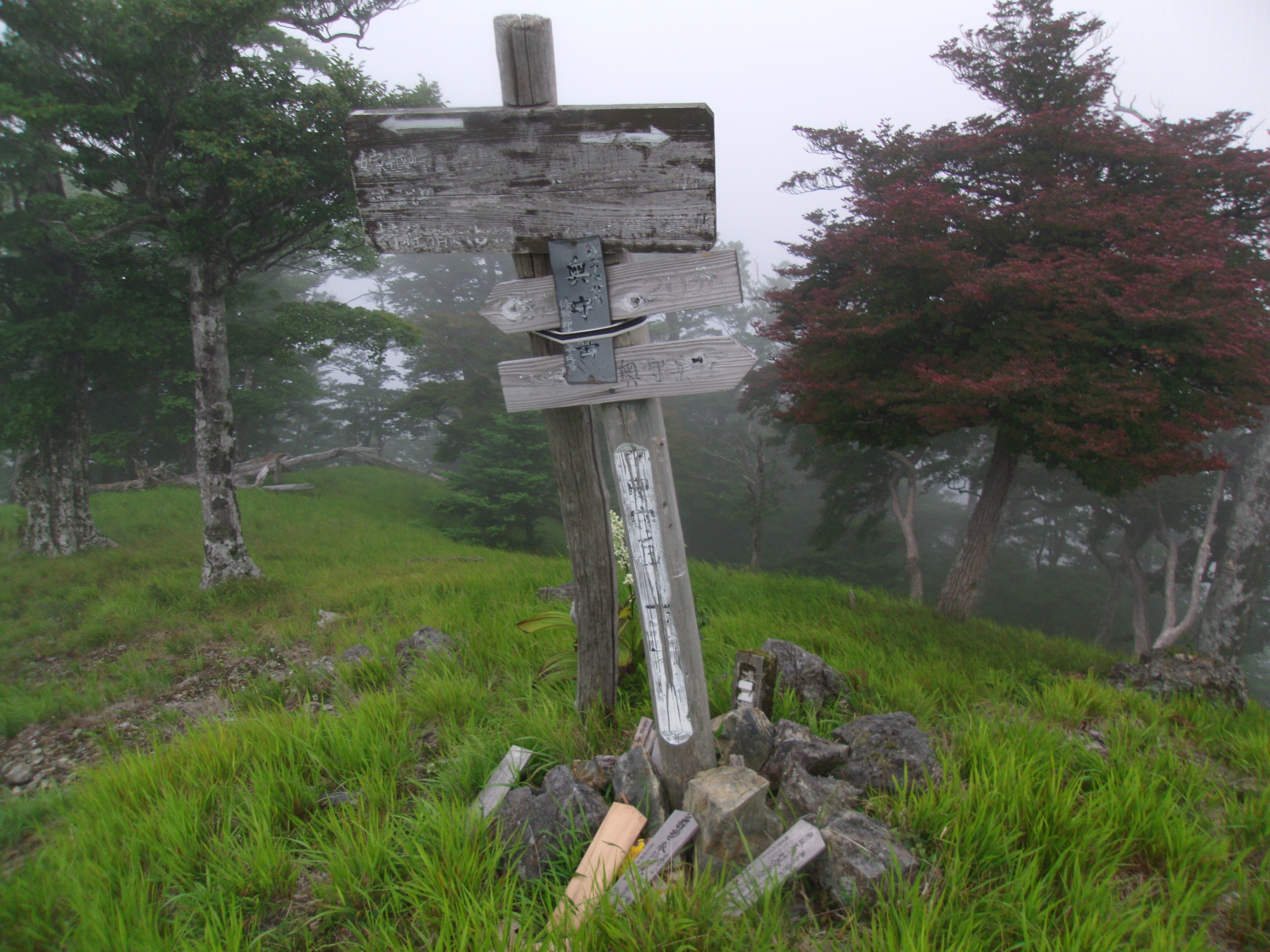 大峯奥駈道第27靡「奥守岳」